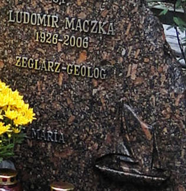 Napis na głazie nagrobnym Ludomira Mączki na Cmentarzu Centralnym w Szzecinie